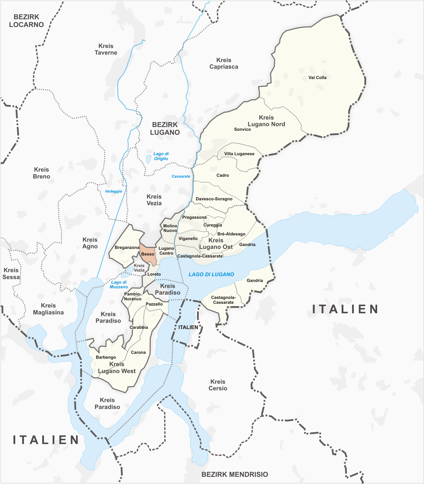 Quartier Besso